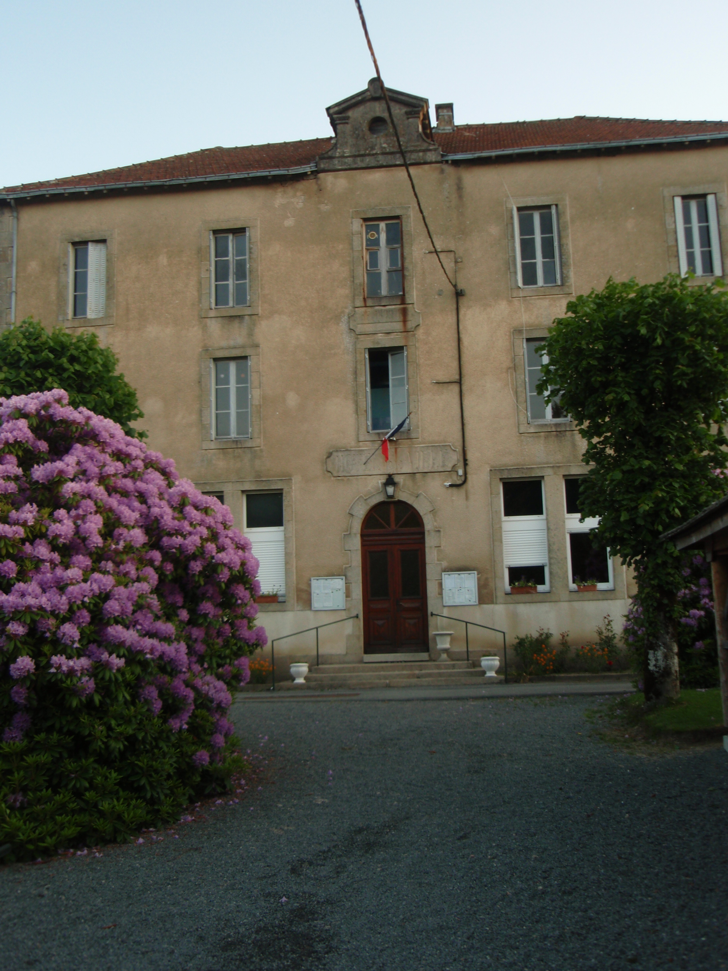 Royère-de-Vassivière Hôtel de Ville